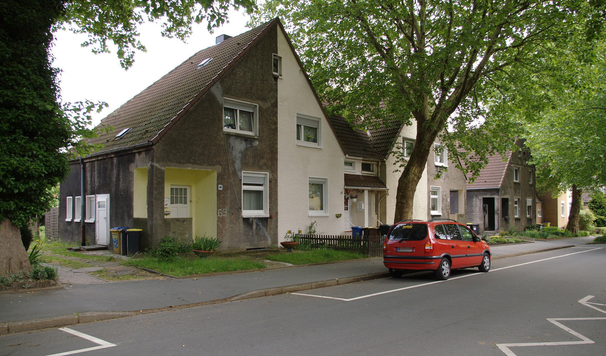 Müsersiedlung, Dortmund-Derne, Nordrhein-Westfalen. Ältere Bebauung Müserstraße